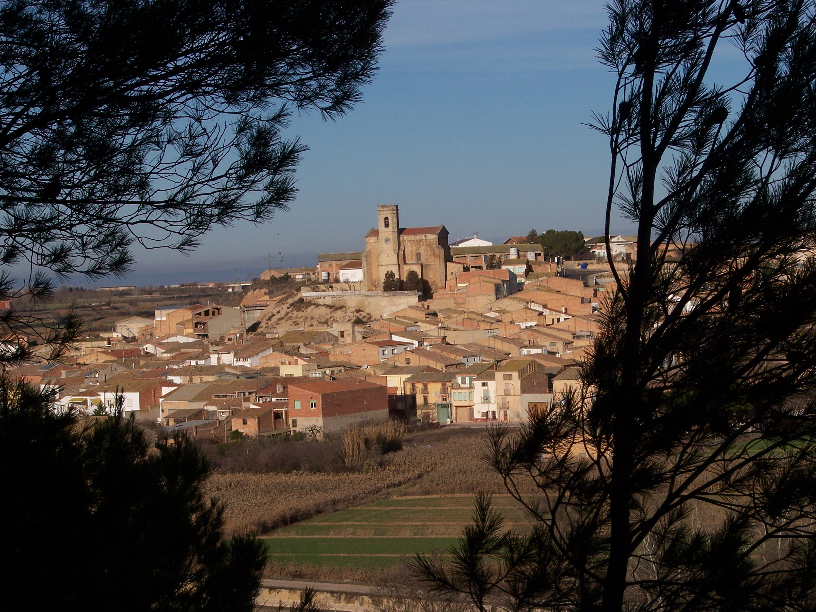 Preixana vist des de l'ermita de Montalbà